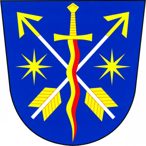 Znak, Postřelmůvek, okres Šumperk